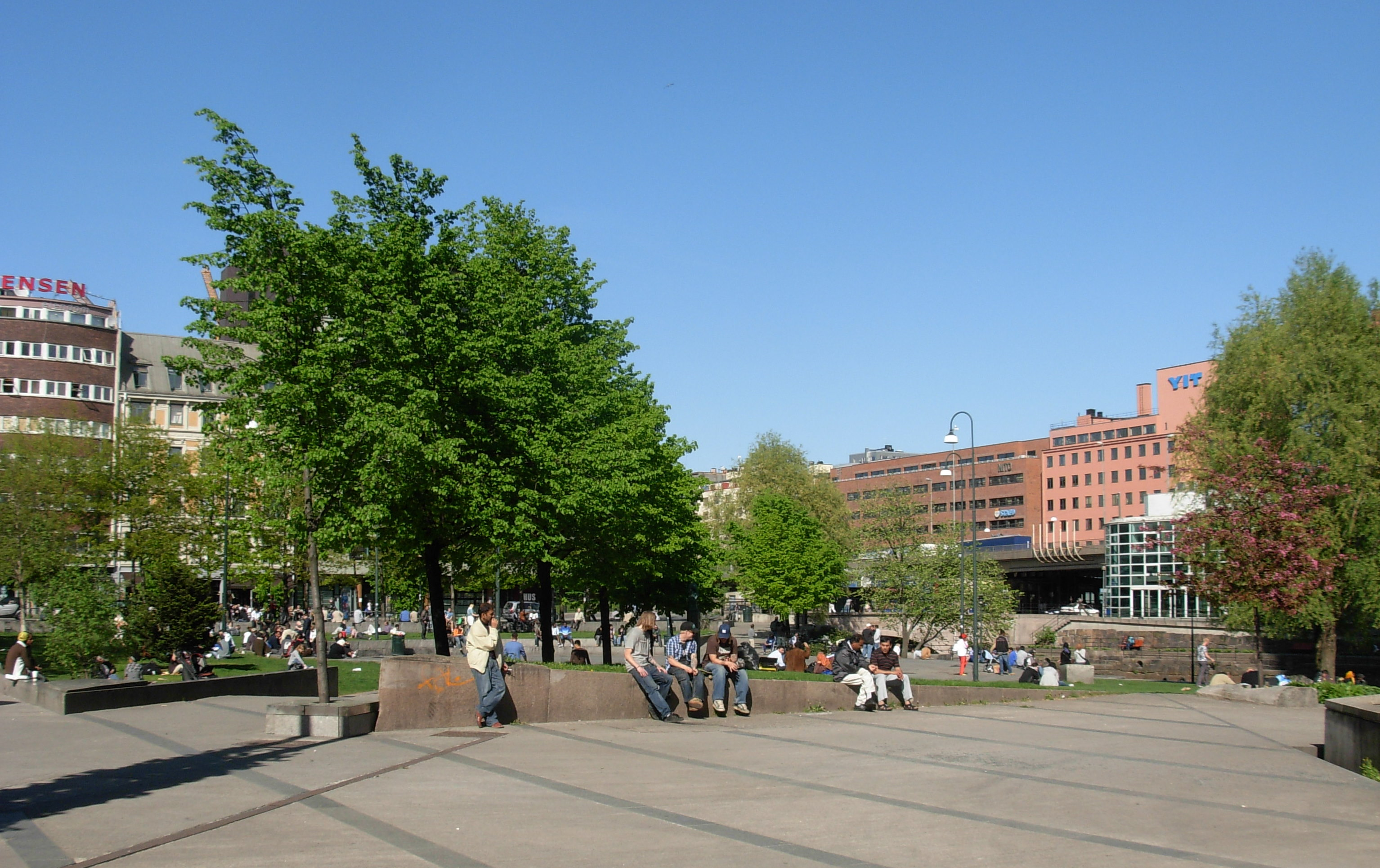 Vaterlandsparken, seen from south